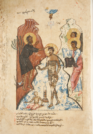 გრიგოლ ღვთისმეტყველის თხზულებანი (A-109)